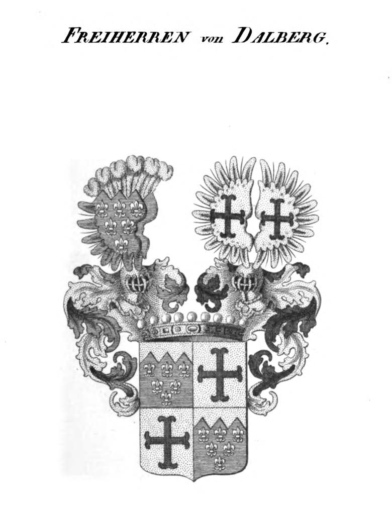 Wappen Dalberg - Tyroff HA.jpg